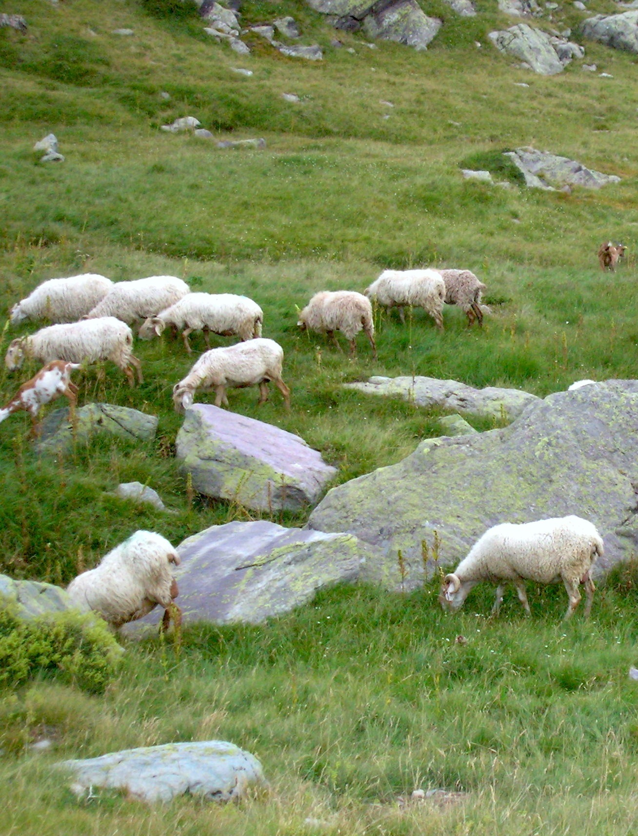 Brebis de race Brigasque. Visite guidée de la Vallée des Merveilles. Tende, Alpes-Maritimes, Provence-Alpes-Côte d'Azur, France.